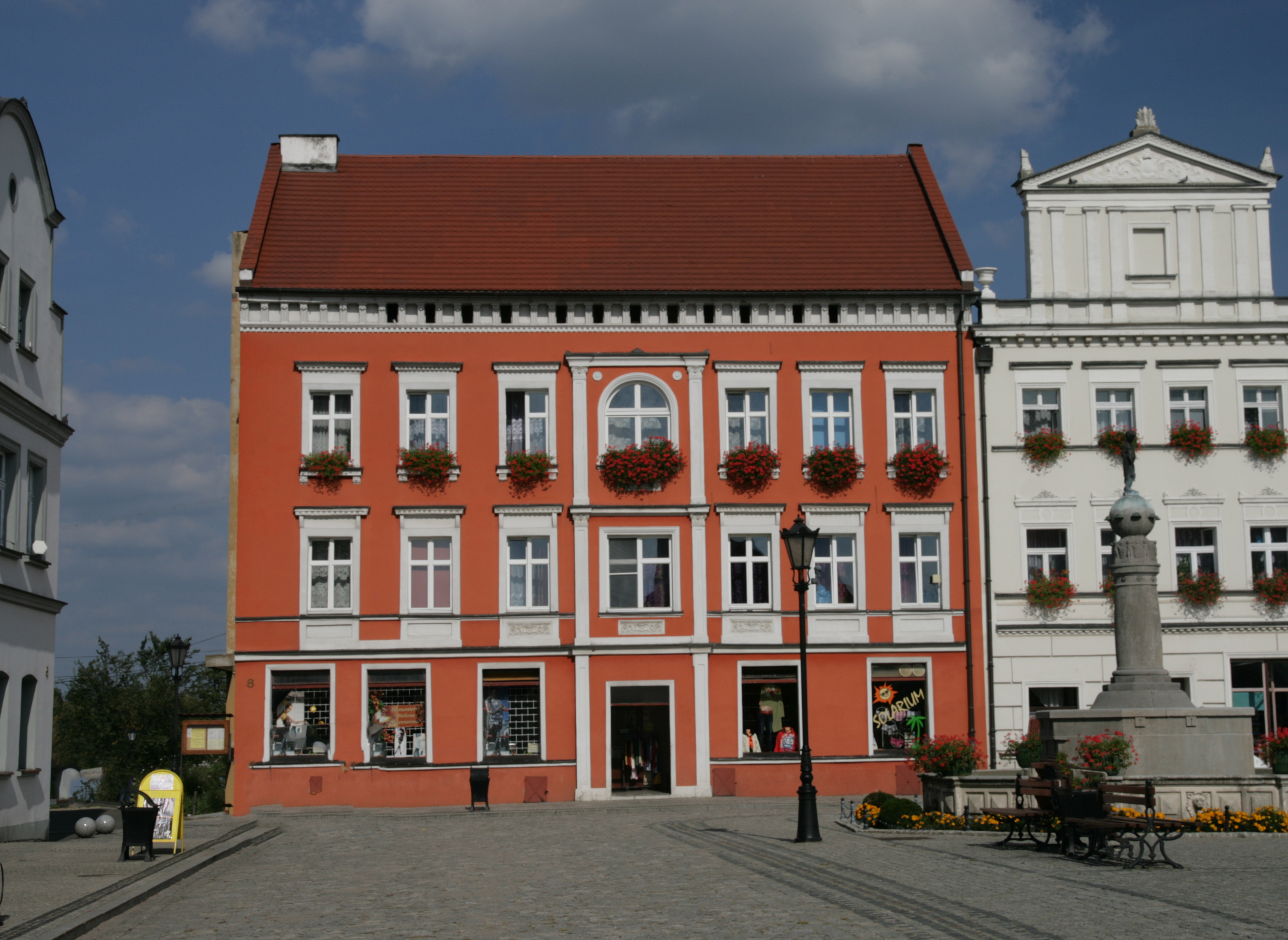 Dom (kamieniczka), mur., XVII, 1822, 1970-1971,, Bytom Odrzański, Rynek 8 04.1963.